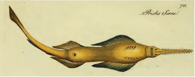 Изображение обыкновенного пилорыла, описанного как Pristis pectinata syn. P. serra